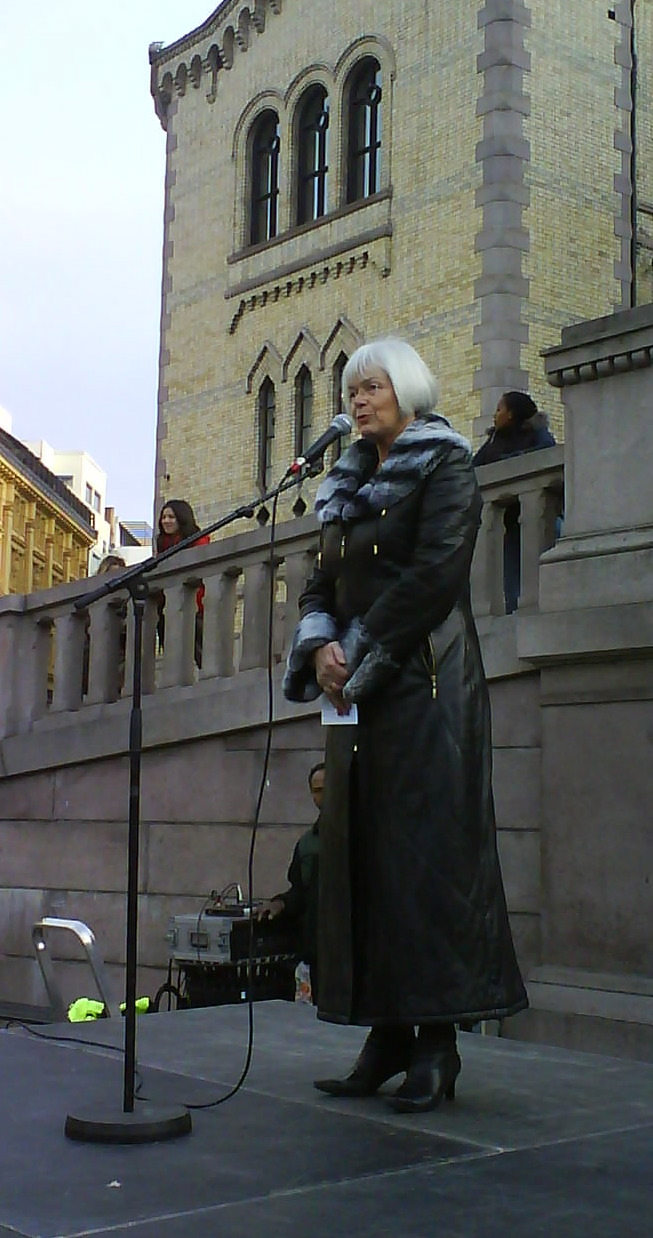 Tora Aasland